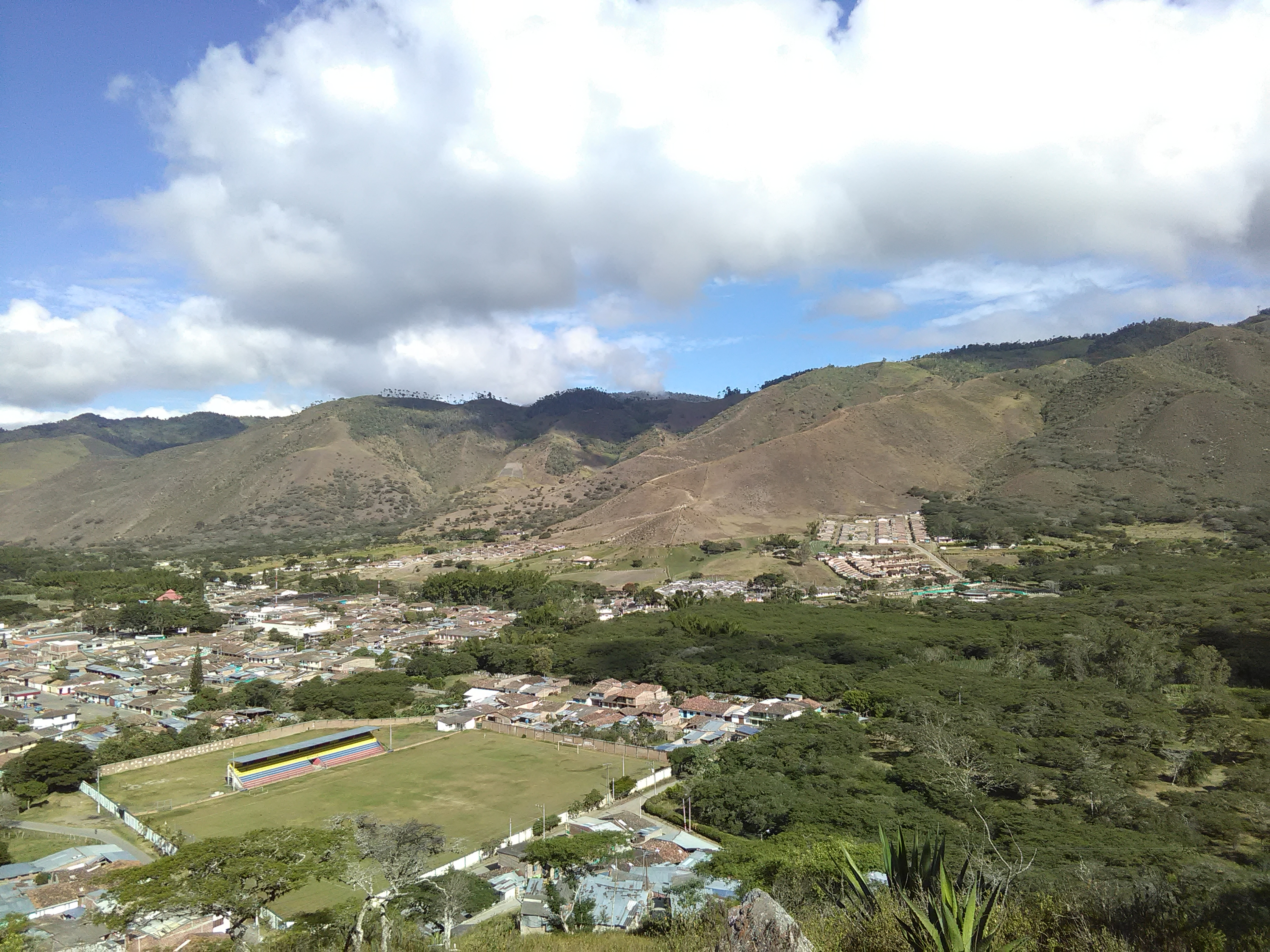 Bajo los colores Verde, Amarillo y Blanco de su Bandera, es tomada esta foto desde el Cerro de la Cruz en el Municipio del Valle. Aquí lo observamos en casi toda su dimensión, aunque es más visible toda su Región Nor-Oriente. Con un clima que radica en sus casi 1440 metros sobre el Nivel del Mar, se vive un leve frío durante todos los días del Año. Plano y tranquilo, este Municipio nos recibe todos los días del año, especialmente en sus fiestas, su maravillosa semana Santa y eventos de Fin de Año. Esta fotografía fue tomada en el municipio colombiano con código 76250.